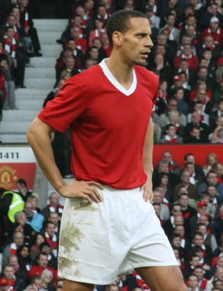 Rio Ferdinand